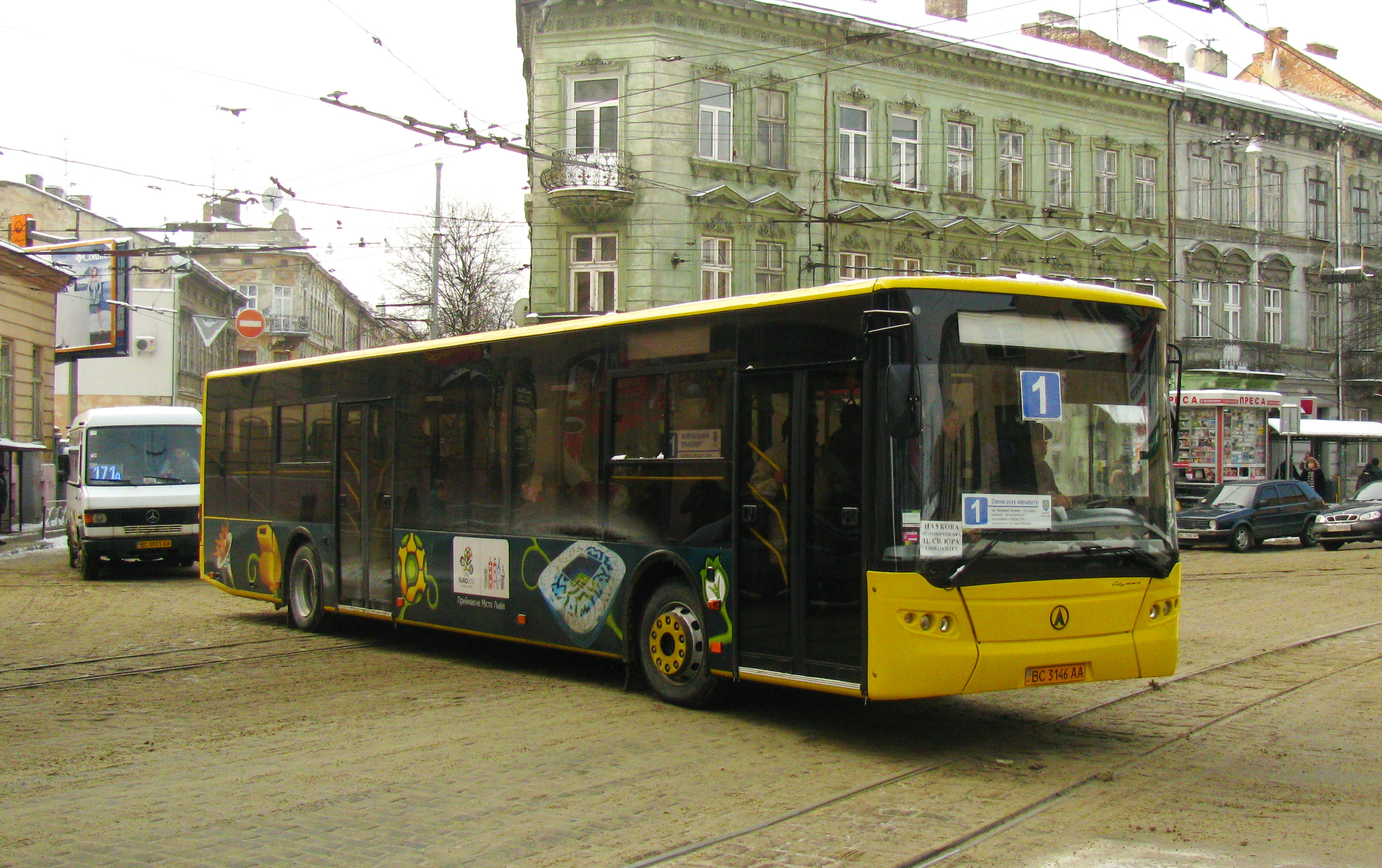 InterLAZ-13,5LE на маршруті № 1 на вулиці Бандери у Львові.